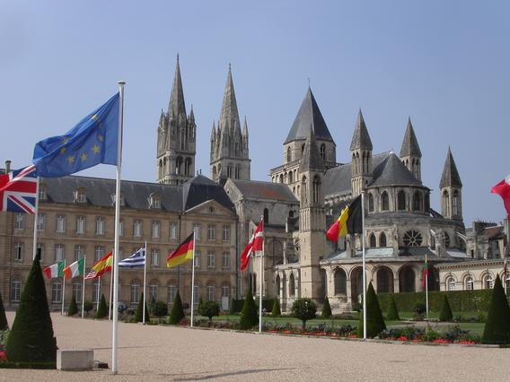 Abbaye aux hommes, Caen, France